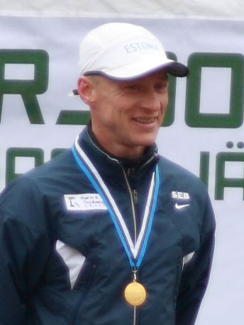 Pavel_Loskutov Eesti meistrivõistluste autasustamisel 12km krossijooksus, 2010. aasta Viljandi järvejooksul